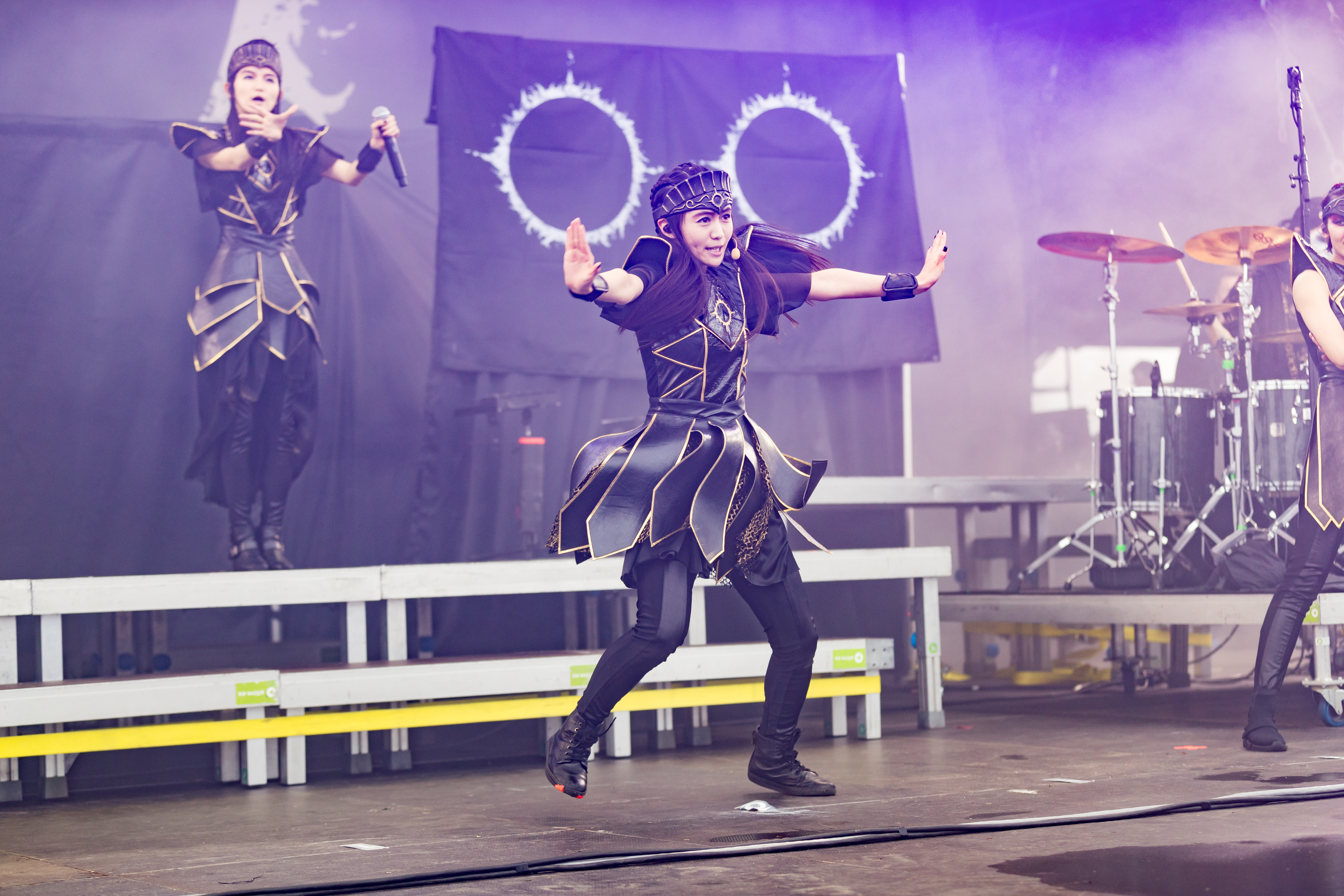 Babymetal @ Rock am Ring 2018